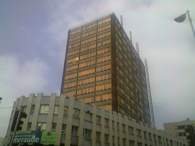 Tour Émeraude au Mans (Sarthe, France).